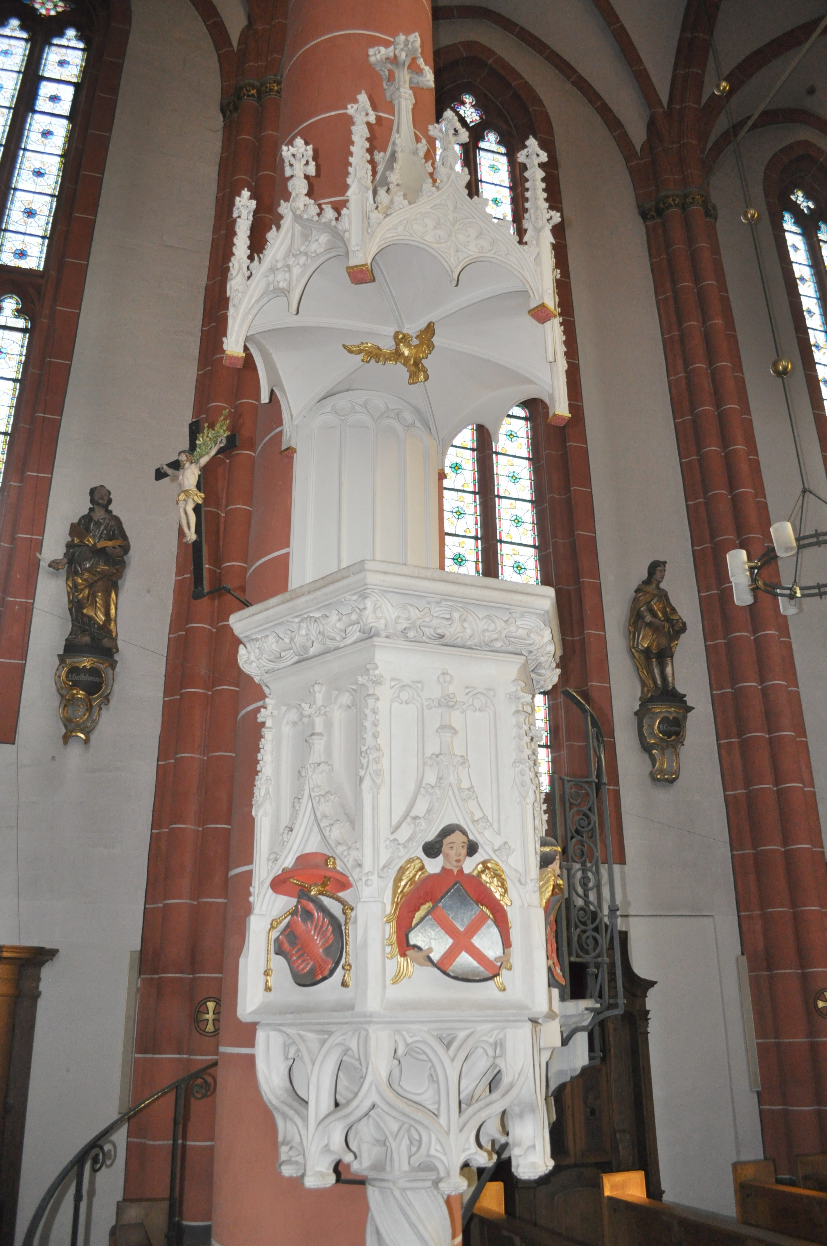 Steinkanzel in der Basilika St. Wendelin in St. Wendel